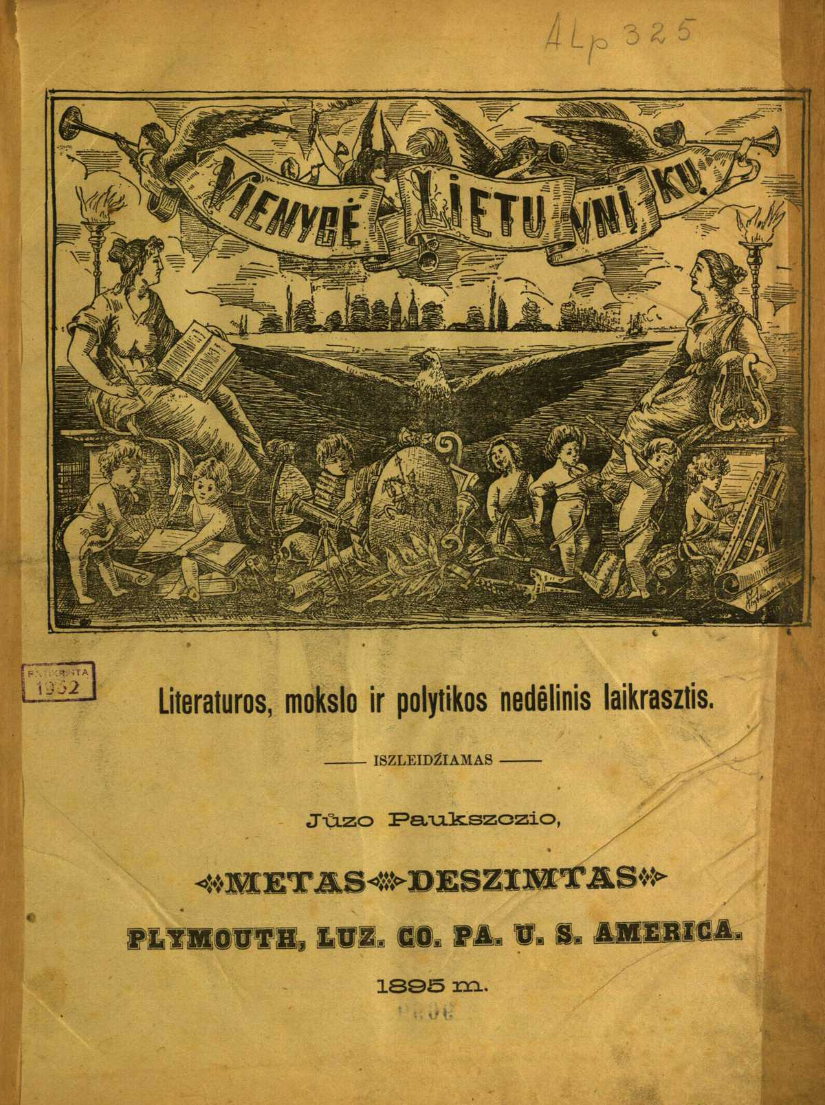 Cover page of Vienybė Lietuvninkų (issue 1, 1895)